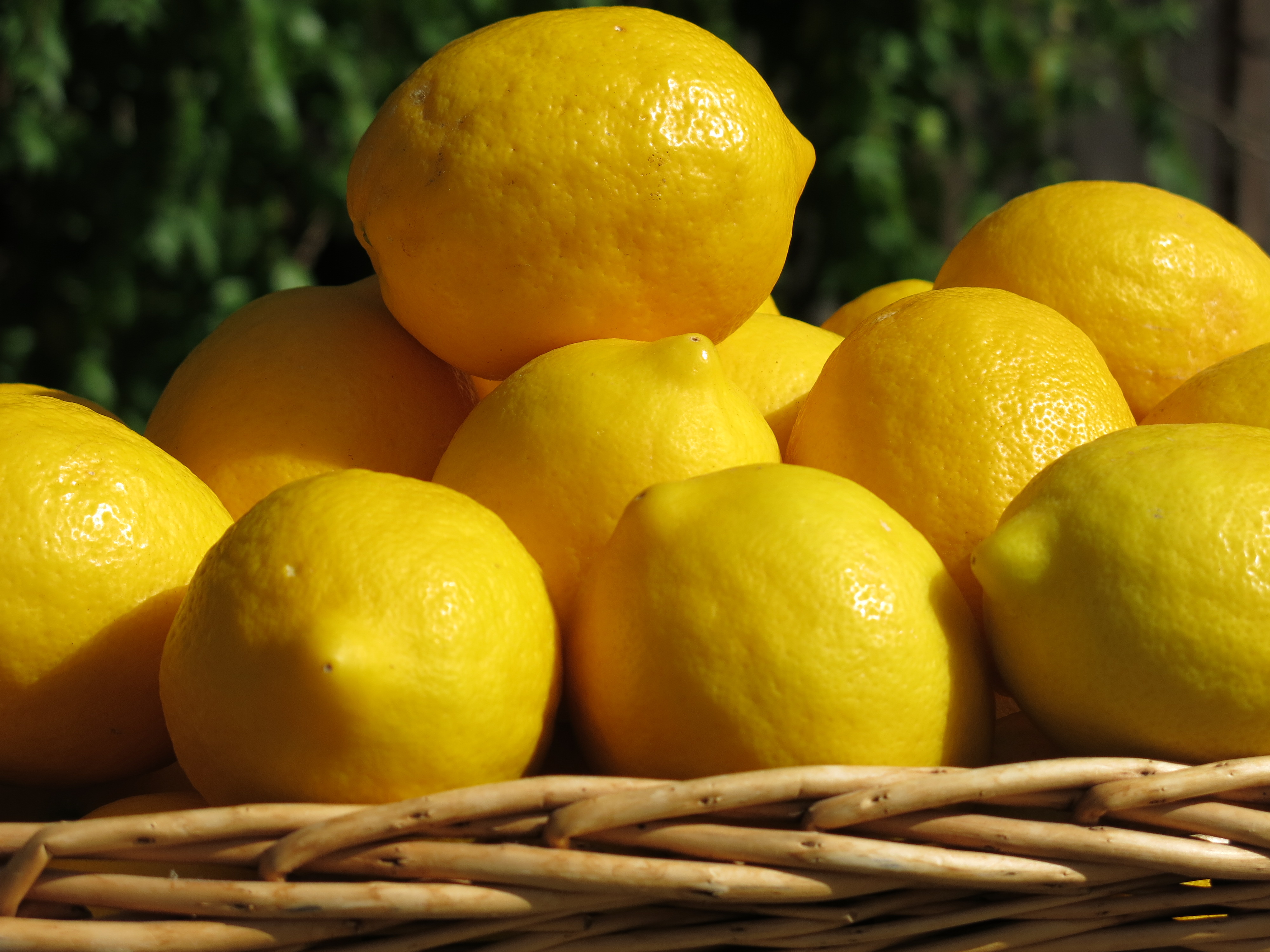 Meyers Zitrone, bot. Citrus × meyeri, in Berkeley (California)